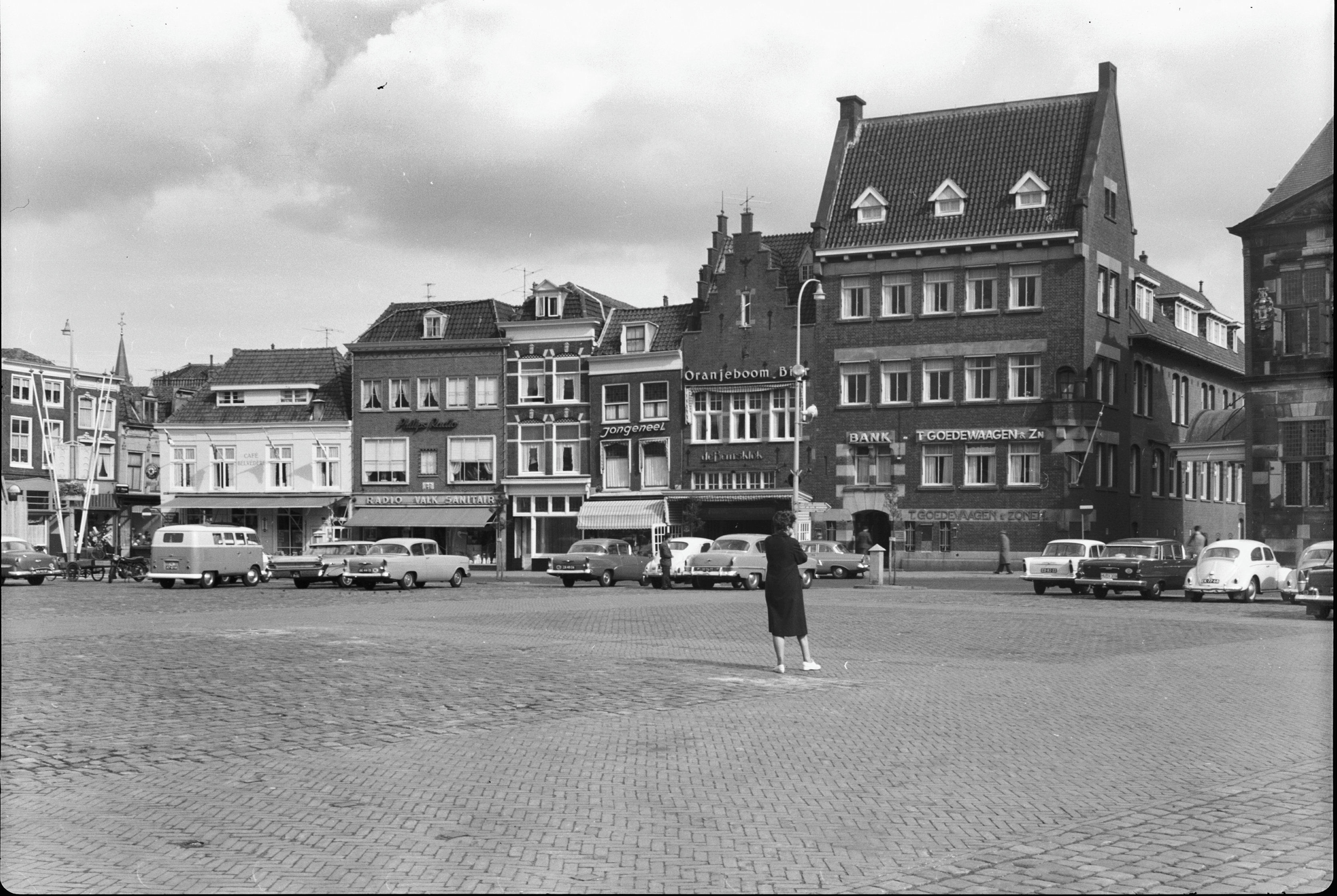 overzicht o.a. Bankgebouw Goedewaagen & Zn. en café De Beursklok en winkel Jongeneel verpakkingen